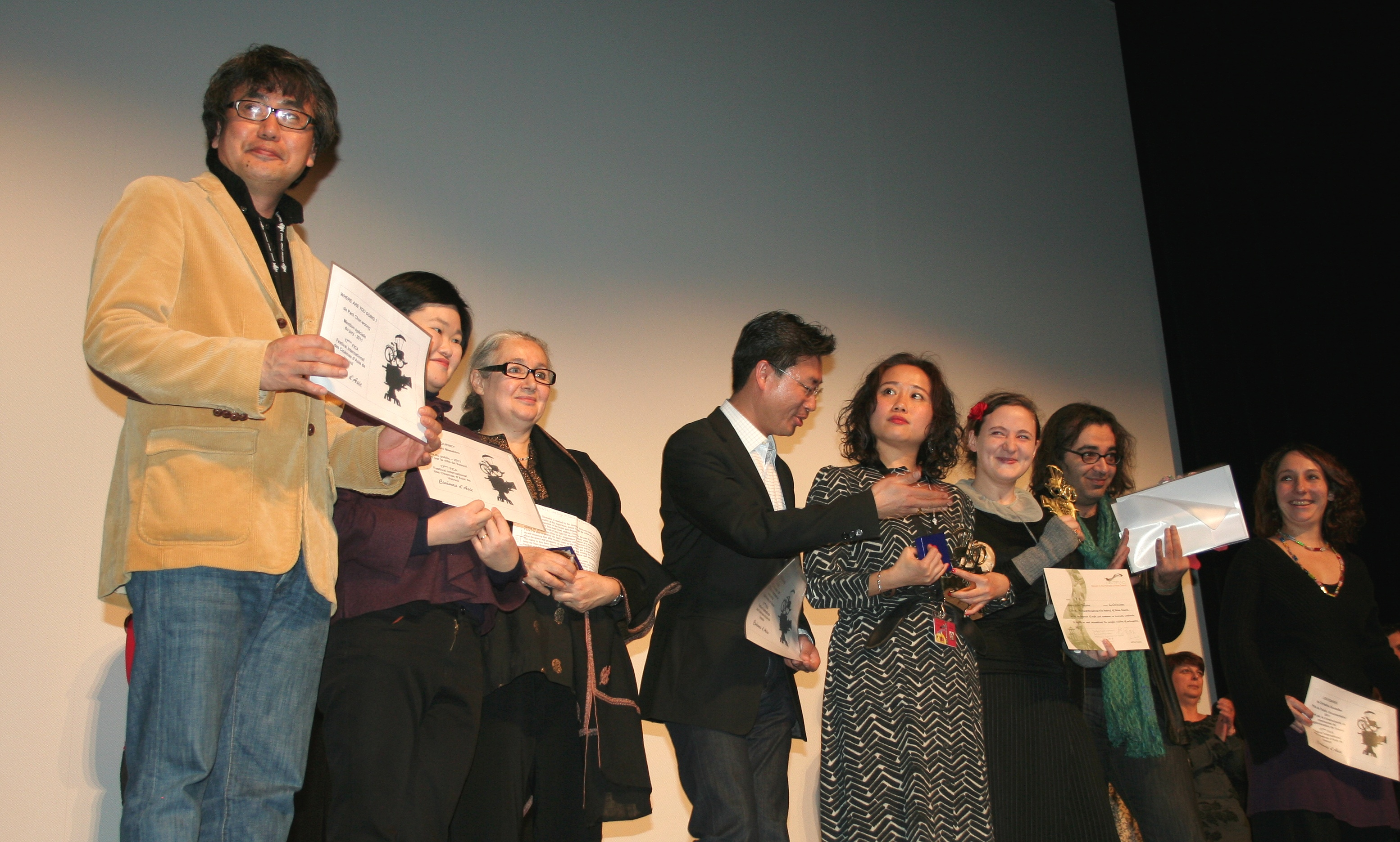 Lauréats FICA 2011, réalisateurs présents : Park Chur-woong Amin Farajpoor, Christine Bouteiller; réalisateurs représentés par Keoprasith Souvannavong pour K.M. Lo, Theresa Kwong pour Liu Hao, Eugenie Zvonkine pour Elkin Tuychiev, Martine Armand pour Girish Kasaravalli et par son assistante pour Masahiro Kobayashi